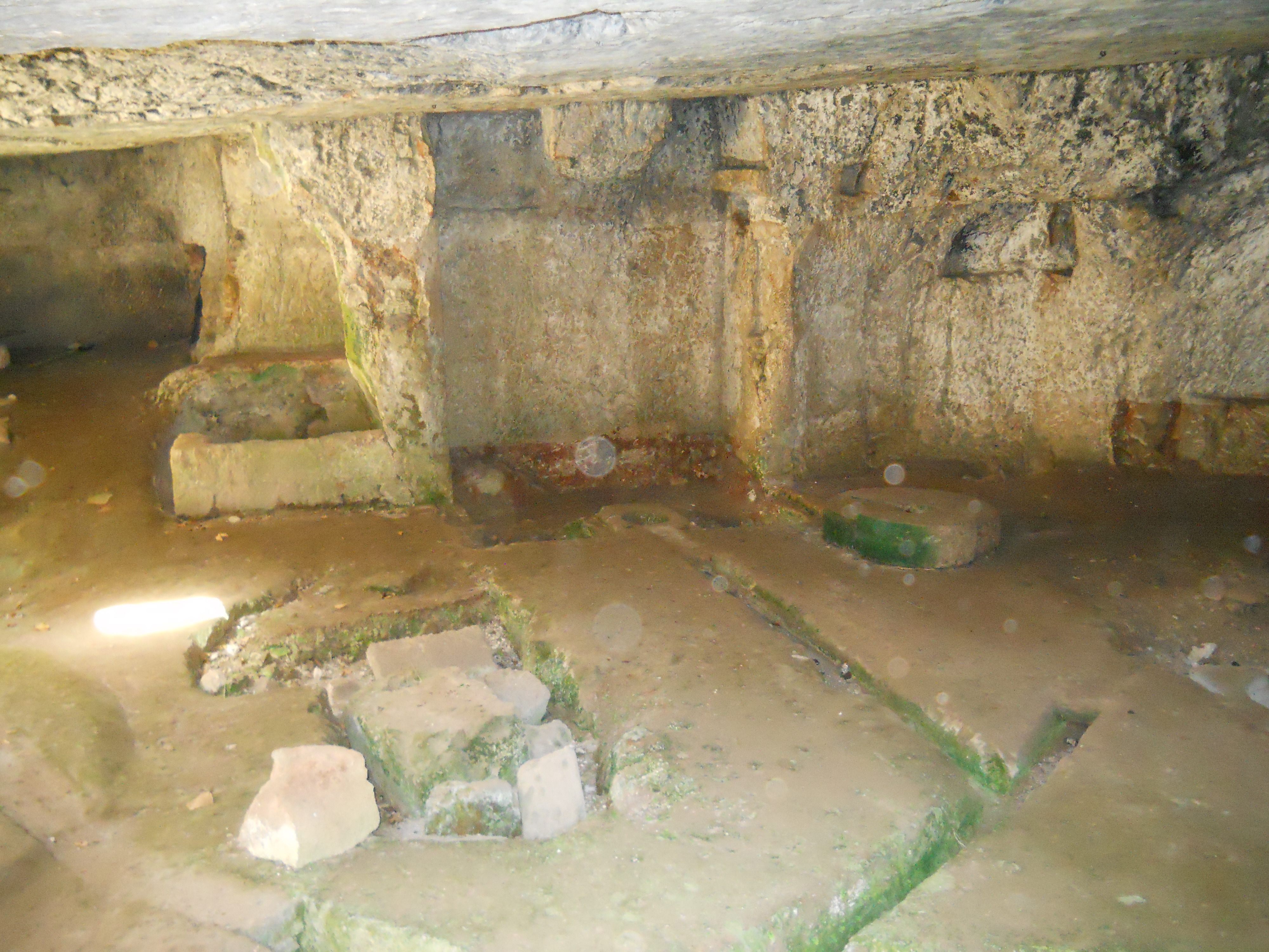 Frantoio Ipogeo "Le Trappite" a Salve, risalente al 1601